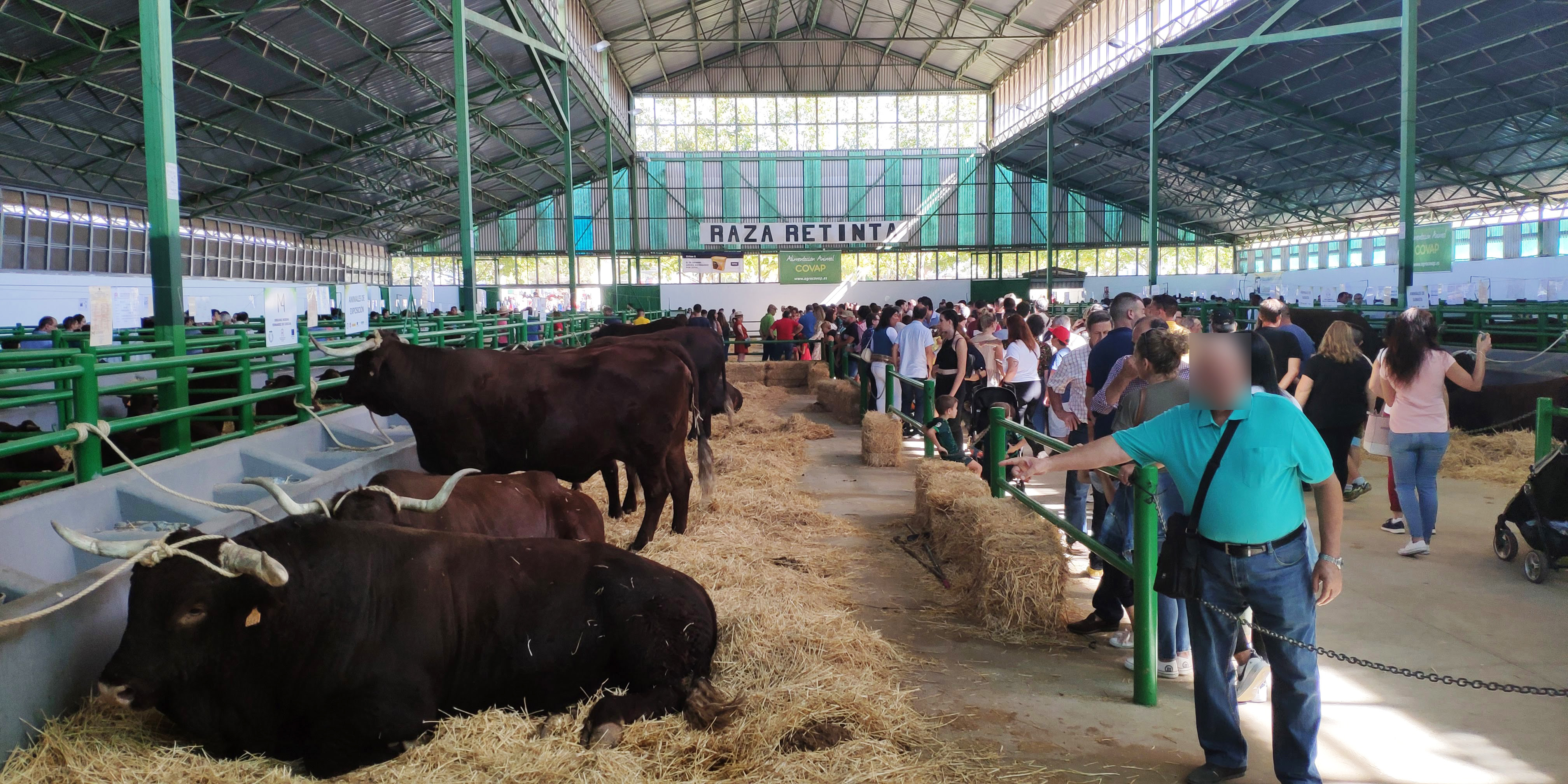 Pabellón de vacunos en la Feria de Zafra, Badajoz (2019)